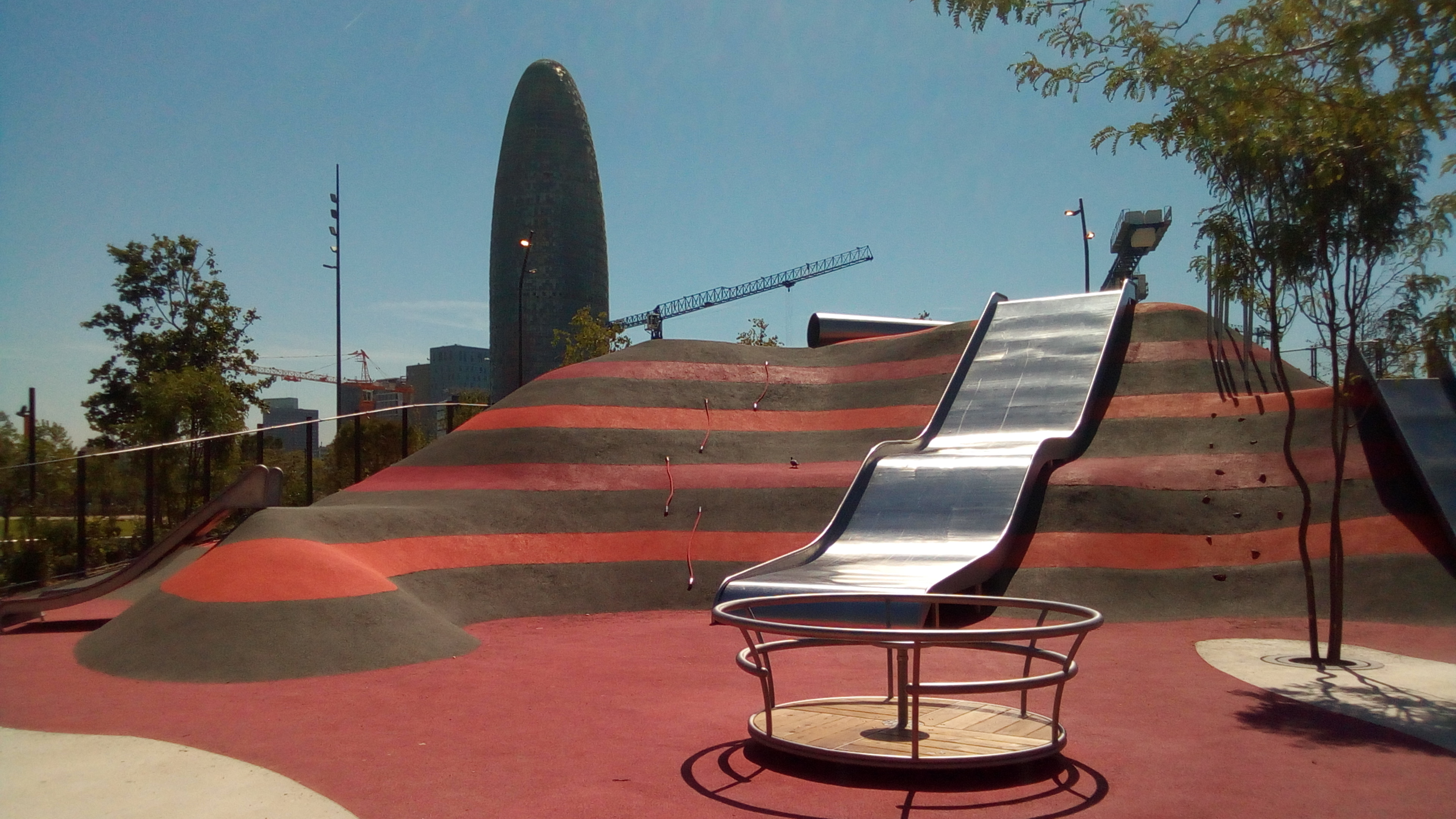 Parque de las Glorias, zona infantil.